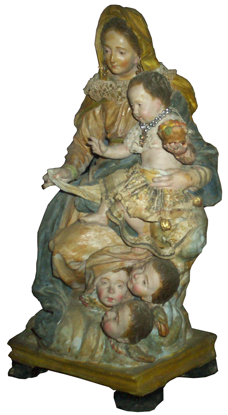 bozzetto in ceramica della statua lignea della Madonna della Provvidenza - Cerreto Sannita